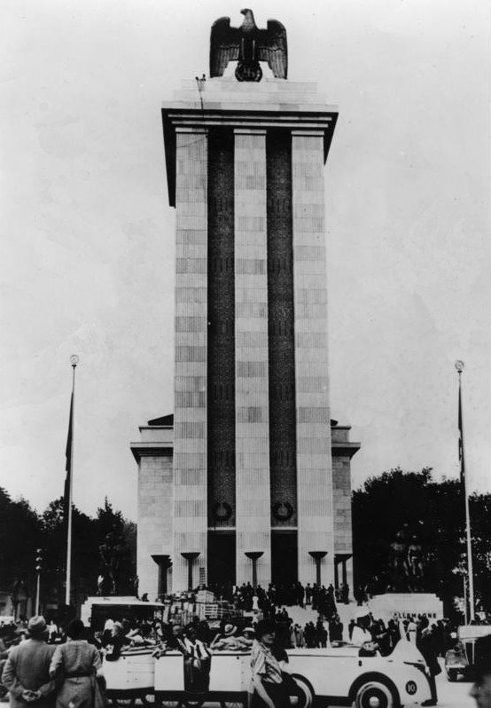 Paris, Weltausstellung, Deutsches Haus Scherl: Bauten des Großdeutschen Reiches. Das Deutsche Haus auf der Weltausstellung in Paris im Jahre 1937. Scherl Bilderdienst 1464 ADN-Bildarchiv: Frankreich 1937: Das Deutsche Haus auf der Weltausstellung in Paris Information added by Wikimedia users.See Image:La Tour Eiffel en 1937 contrast.png and ParisExpo1.jpg for other views of the building.